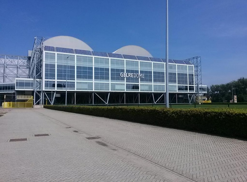 Grasmat van Gelredome vanaf buiten